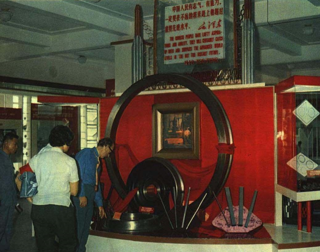 1967-07 1967年 中国21届出口商品交易会